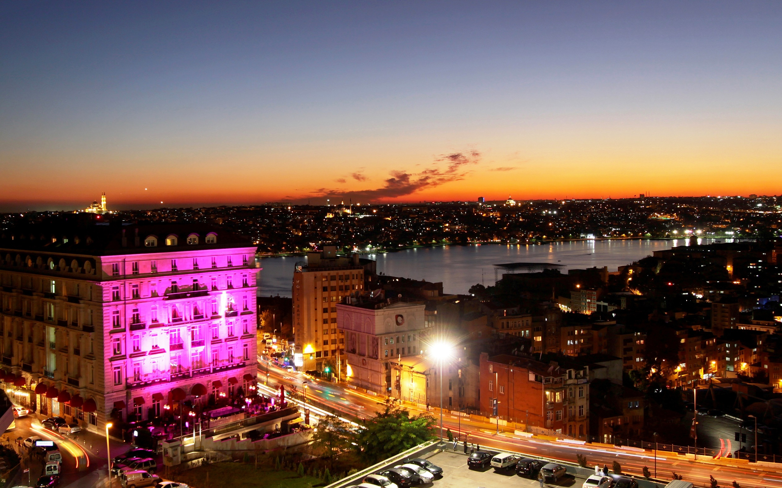 Pera Palace'tan Haliç Manzarası